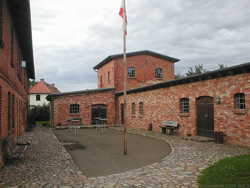 Alte Büdnerei in Lehsten (Gemeinde Möllenhagen)